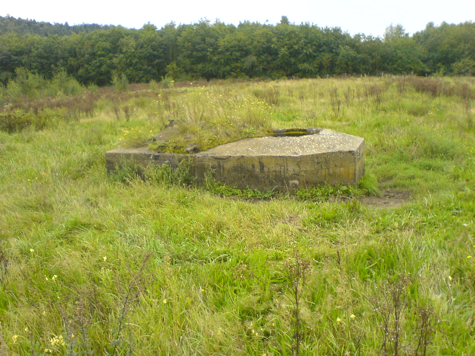 Ringstand Typ 58c am Prinsendijk/NL